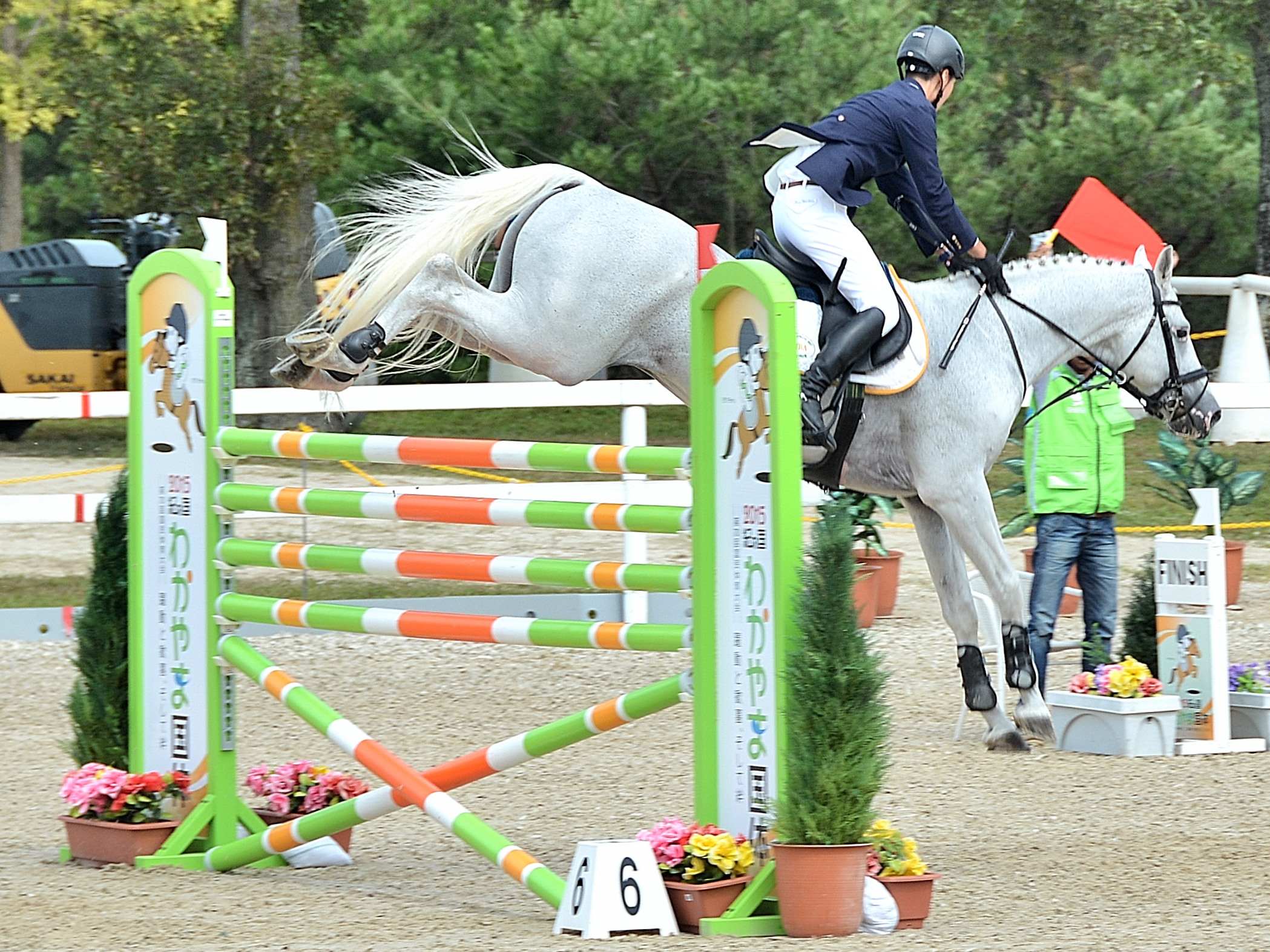 2015年に行われた第70回国民体育大会である「紀の国わかやま国体」の六段障害飛越競技で、飛越する人馬の林義昌とキャリーズサンを、観客席から撮影したもの。